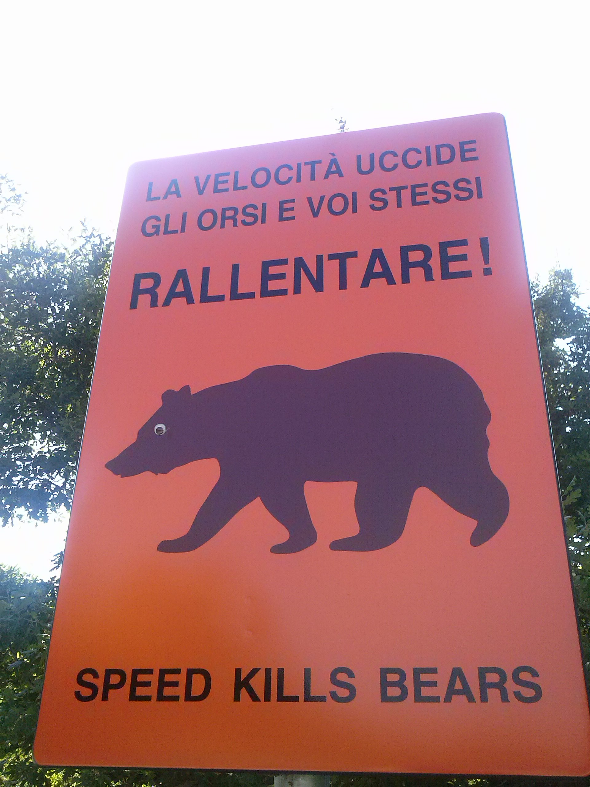 Cartellonistica nel parco nazionale d'Abruzzo